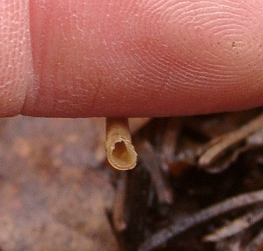 Hohe Röhrenkeule (macrotyphula fistulosa) im "Querschnitt" Ort: Tuchenbach, Landkreis Fürth bei Nürnberg